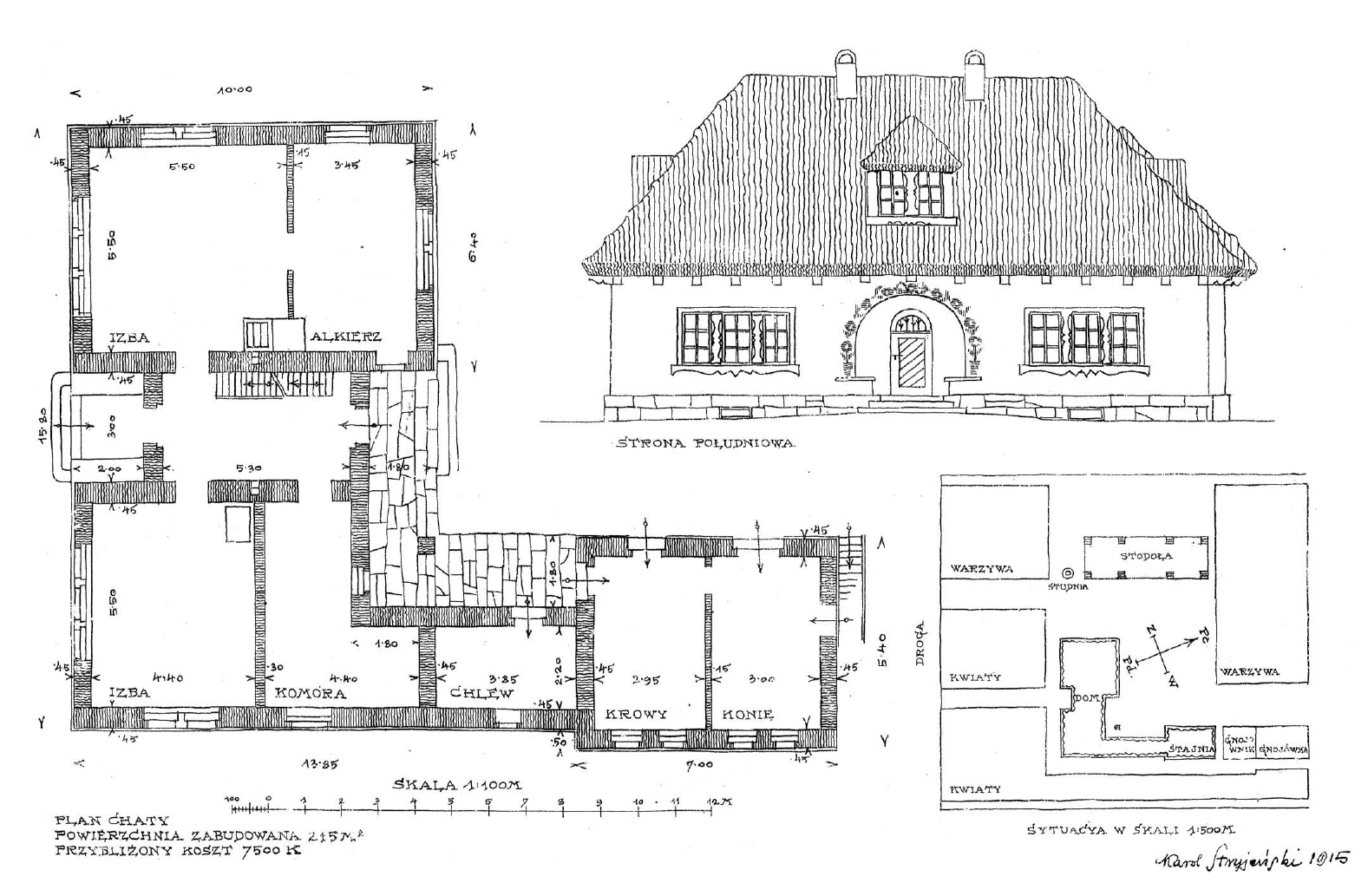 Типовий проект двокімнатної хати з коморою, сіньми, стайнею, і хлівом. Площа 215 м². Опублікований 1915 року в альбомі «Odbudowa polskiej wsi». Автор Кароль Стриєнський (1887—1932).